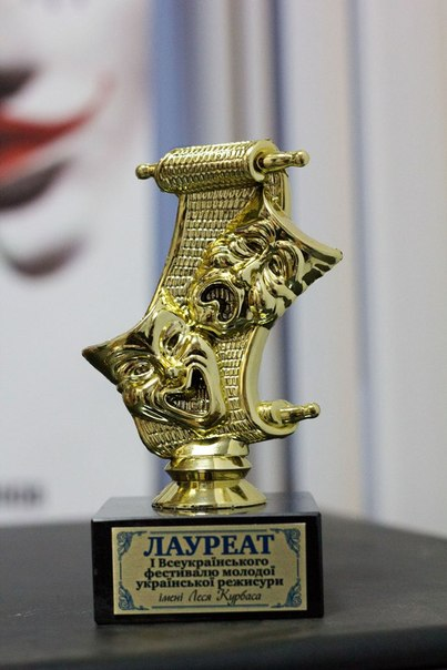 Всеукраинский фестиваль молодой украинской режиссуры имени Леся Курбаса (награда Кармана)